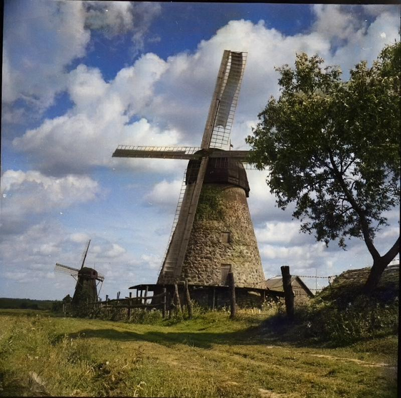 Kupiškio (Malūnų g.) malūnai XX a. 3 deš.